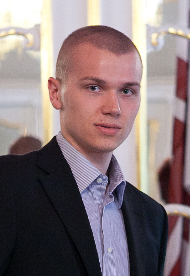 Oskars Cibuļskis